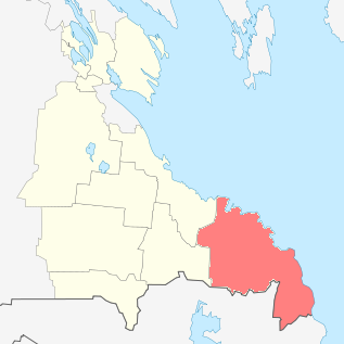 Вепсская национальная волость, Республика Карелия